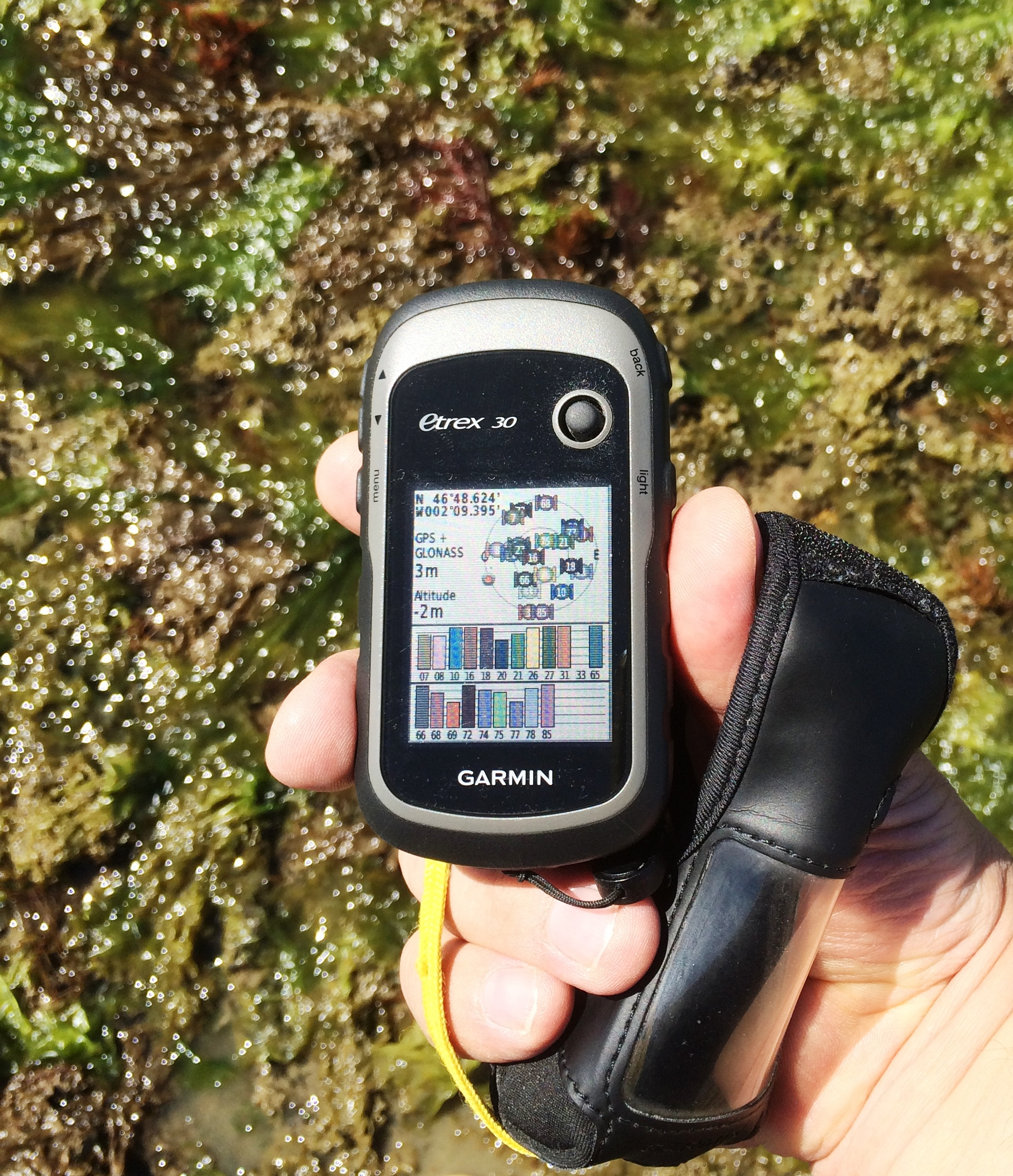 Sur le Pont d'Yeu. Fin de la marée basse (coefficient de marée 102). Mesure avec un GPS GLONASS Etrex 30 GARMIN.